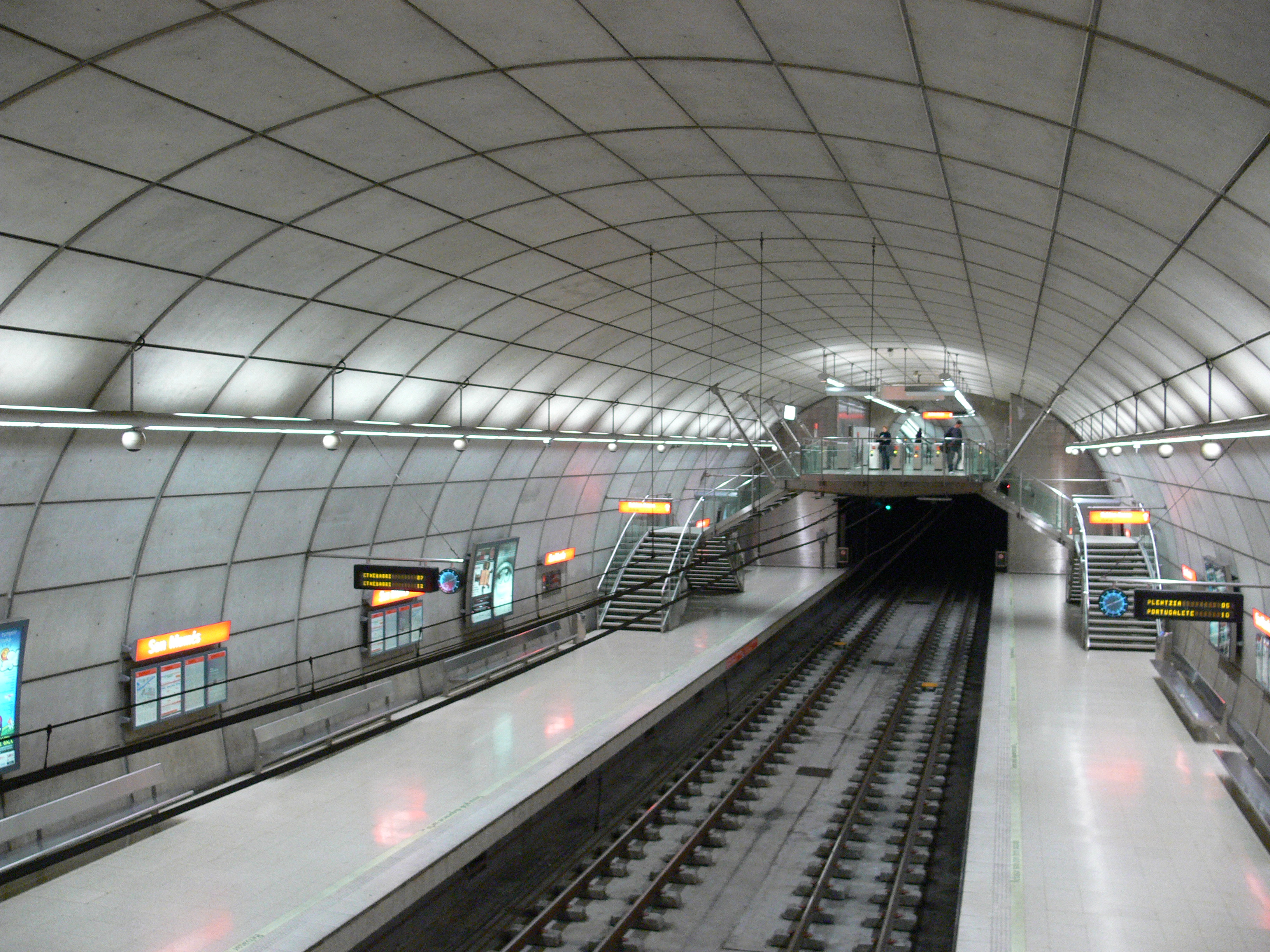 San Mamés metro station (Lines 1+2), Bilbao